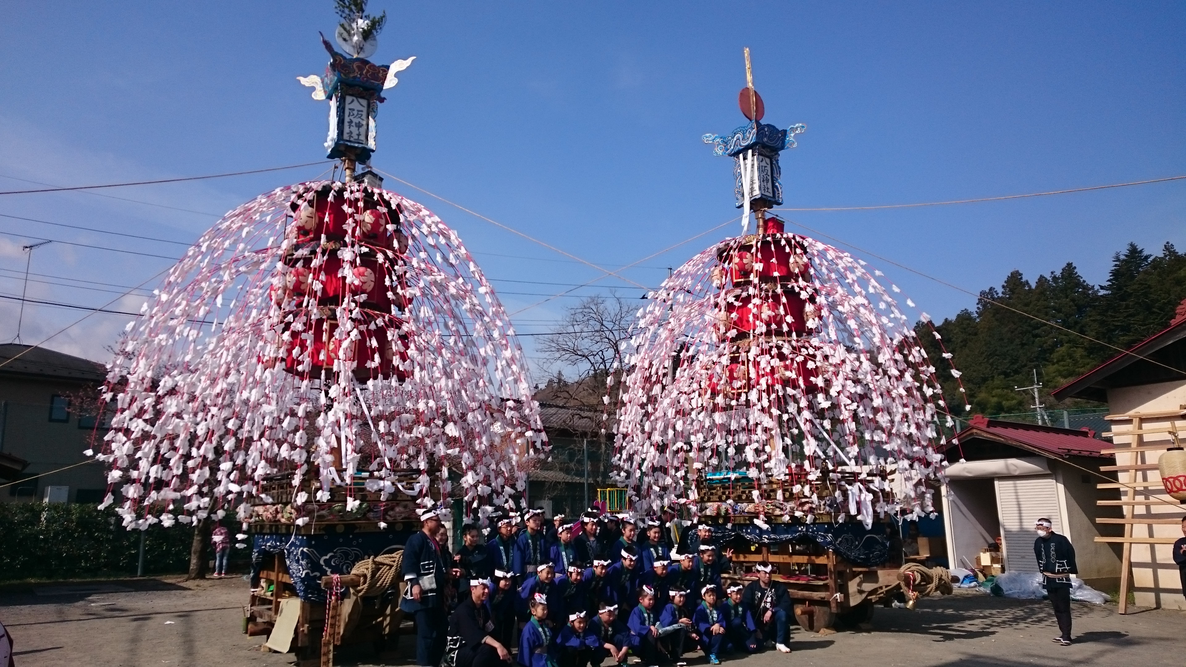 宇根の山車と住民